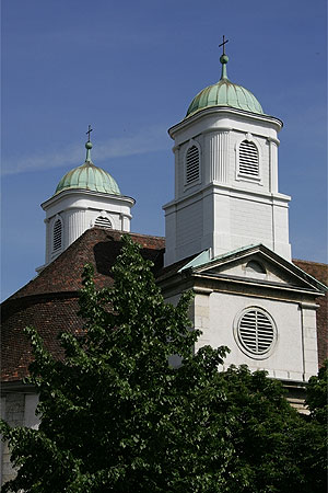 Olten: christ-kath. Stadtkirche